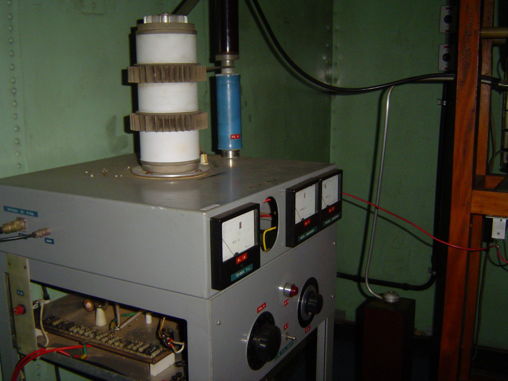 ito de Potência de um transmissor de sondagem ionosférica em VLF, potência de transmissão: 1.300.000 W.